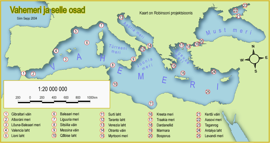 Vahemere kaart